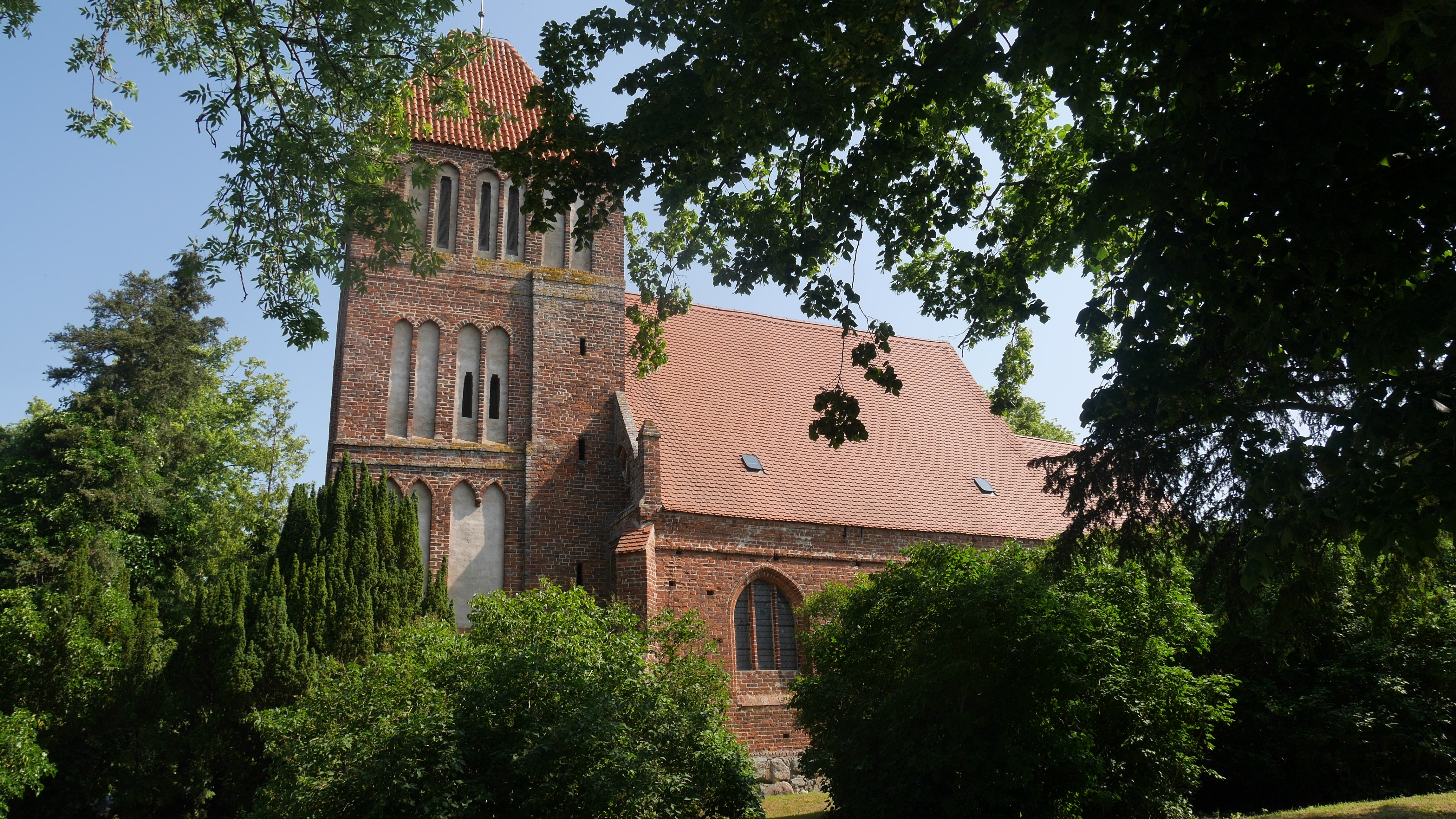 St.-Margarethen-Kirche (Patzig) Süd